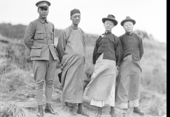 1929年，蒋介石、王宠惠、胡汉民、伍朝枢（自左至右）在南京汤山。